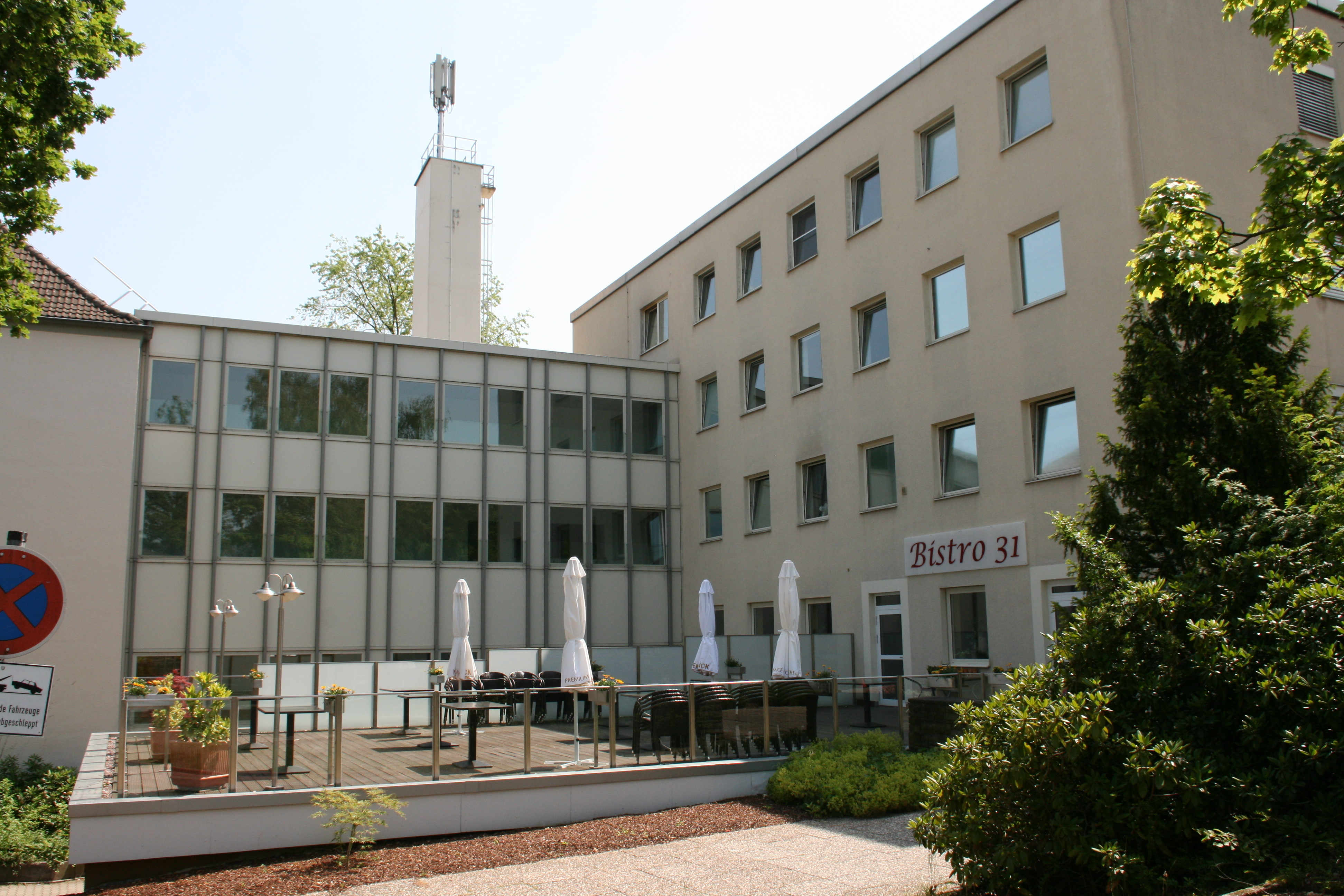 St.-Elisabeth-Krankenhaus, Essener Straße 31 in Hattingen-Niederwenigern